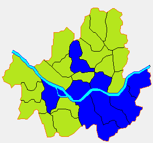 대한민국 제5회 지방 선거 서울특별시의회의원 비례대표 선거 지역별 1위 정당(파란색: 한나라당이 1위인 지역초록색: 민주당이 1위인 지역)